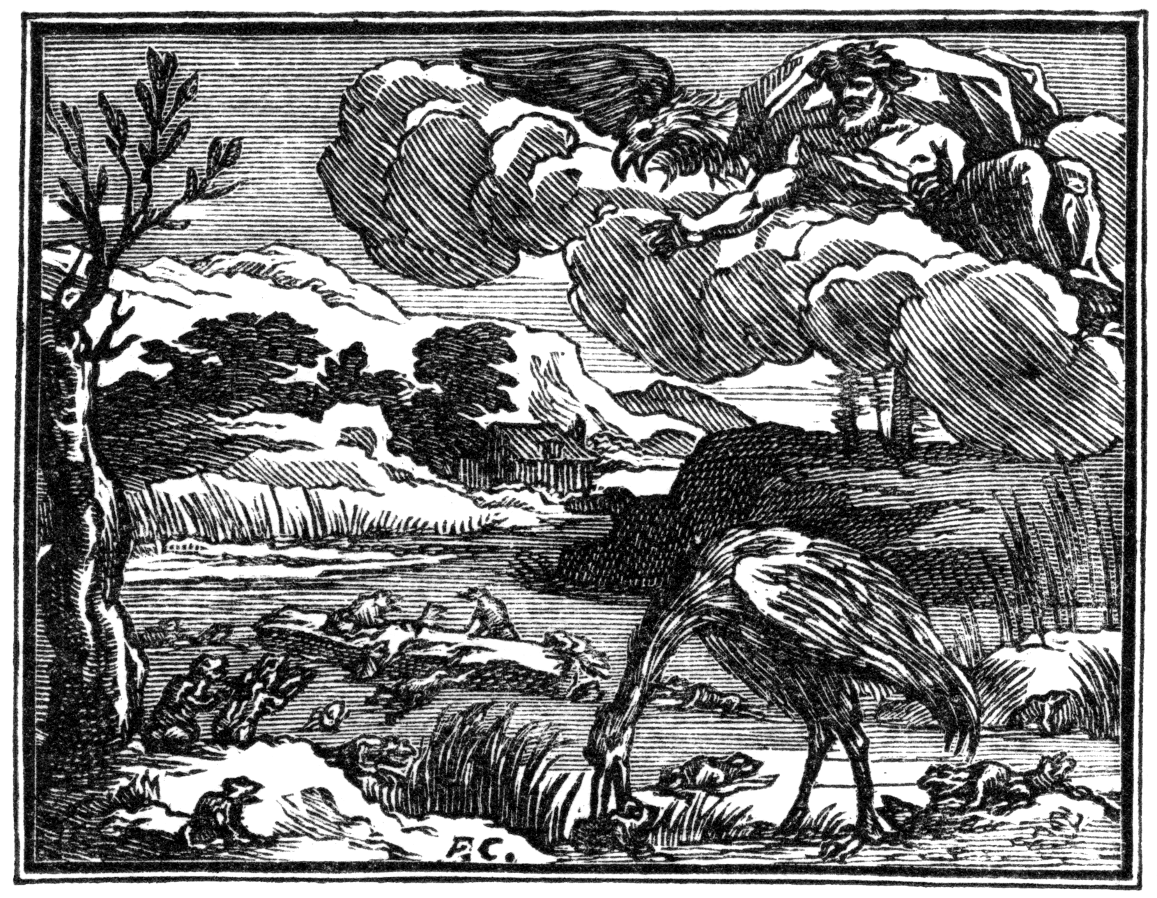 Illustrations pour les « Fables choisies mises en vers par M. de la Fontaine », Claude Barbin et Denys Thierry, Paris, 1668 (premier recueil) 1678-79 (deuxième recueil) 1694 (troisième recueil). Numérotation Charpentier (1705).